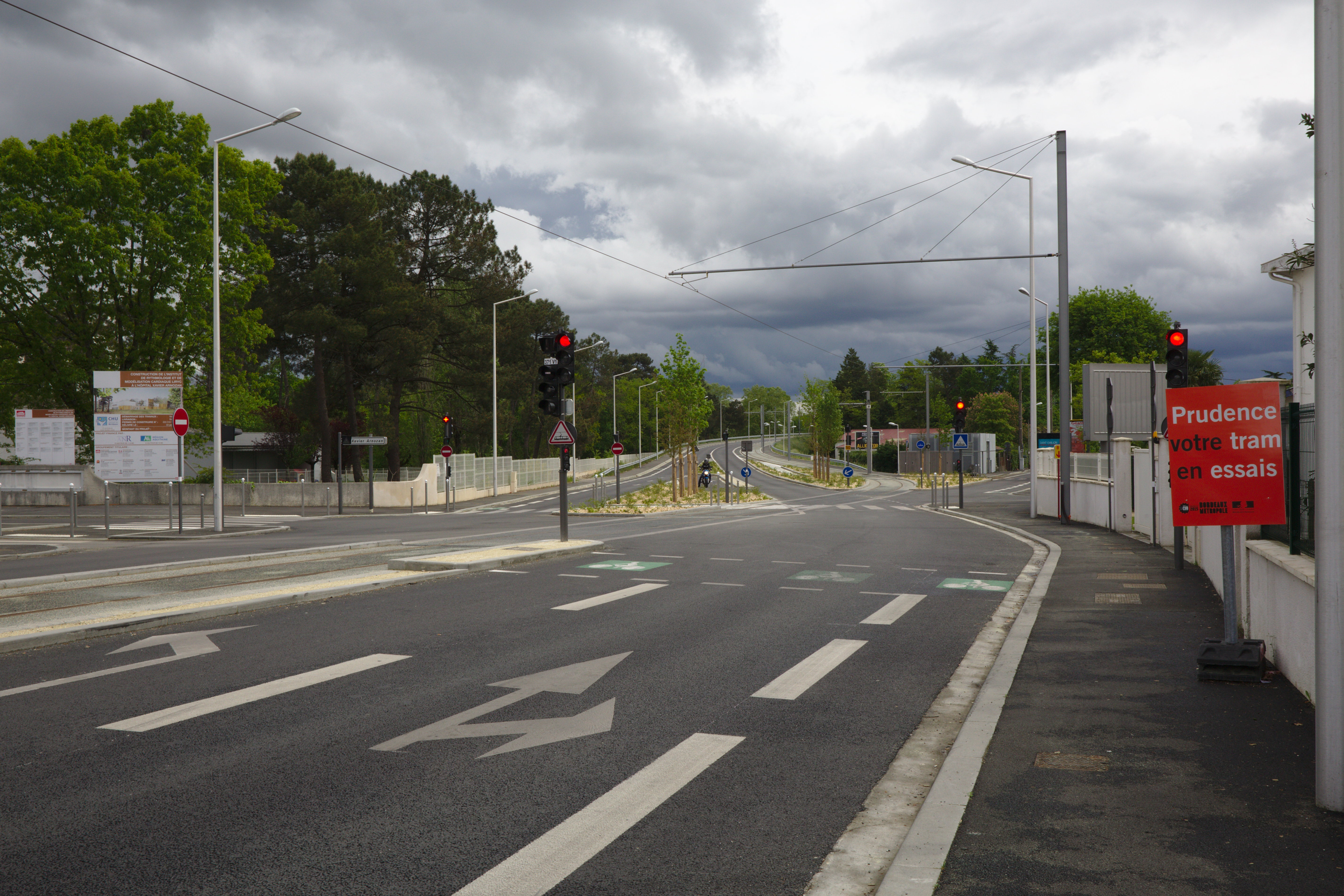 Exploitation du tram en voie unique sur l'extension vers Pessac Alouette, ici devant l'hôpital Xavier Arnozan.